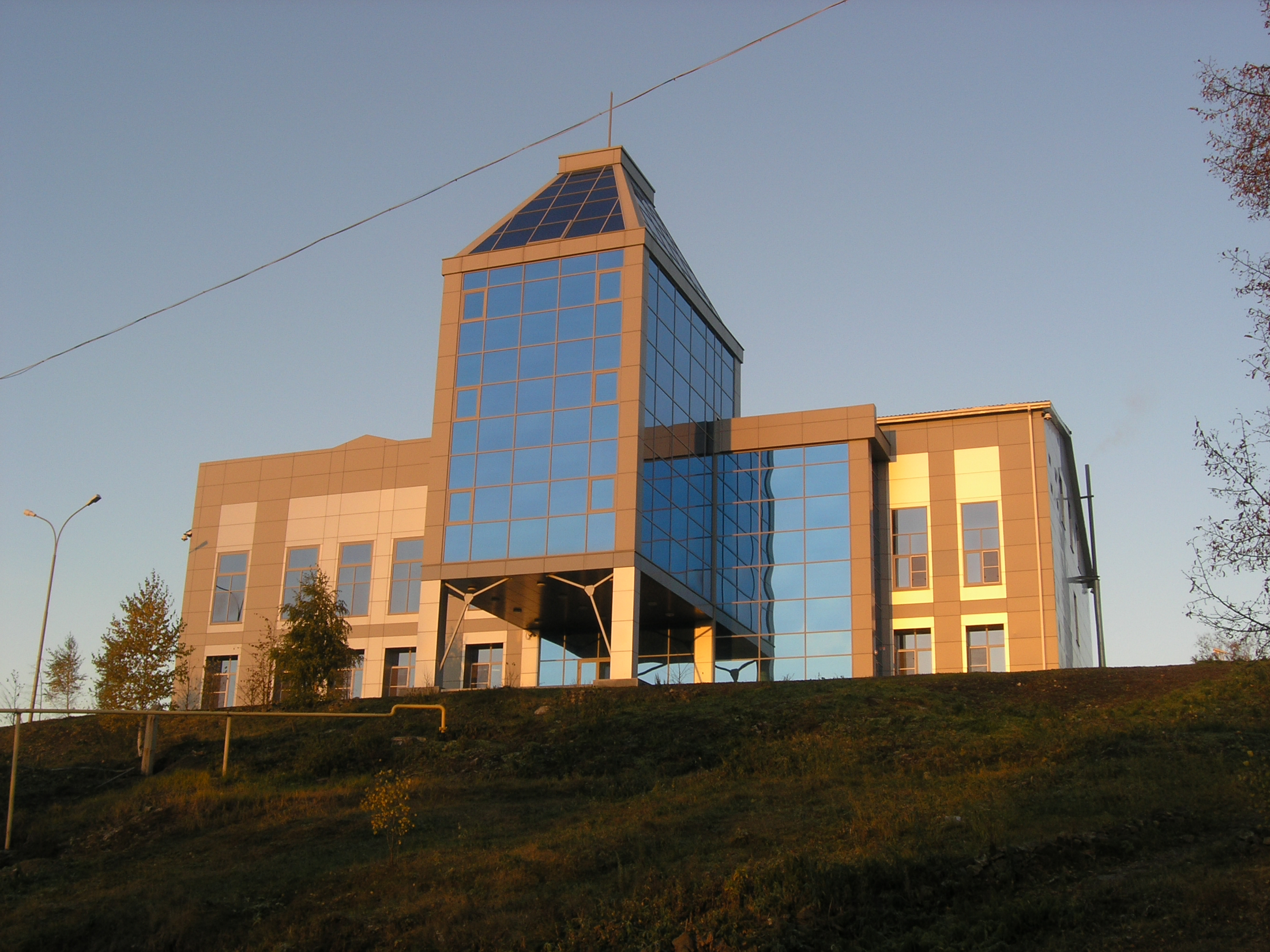 Демидов-Центр